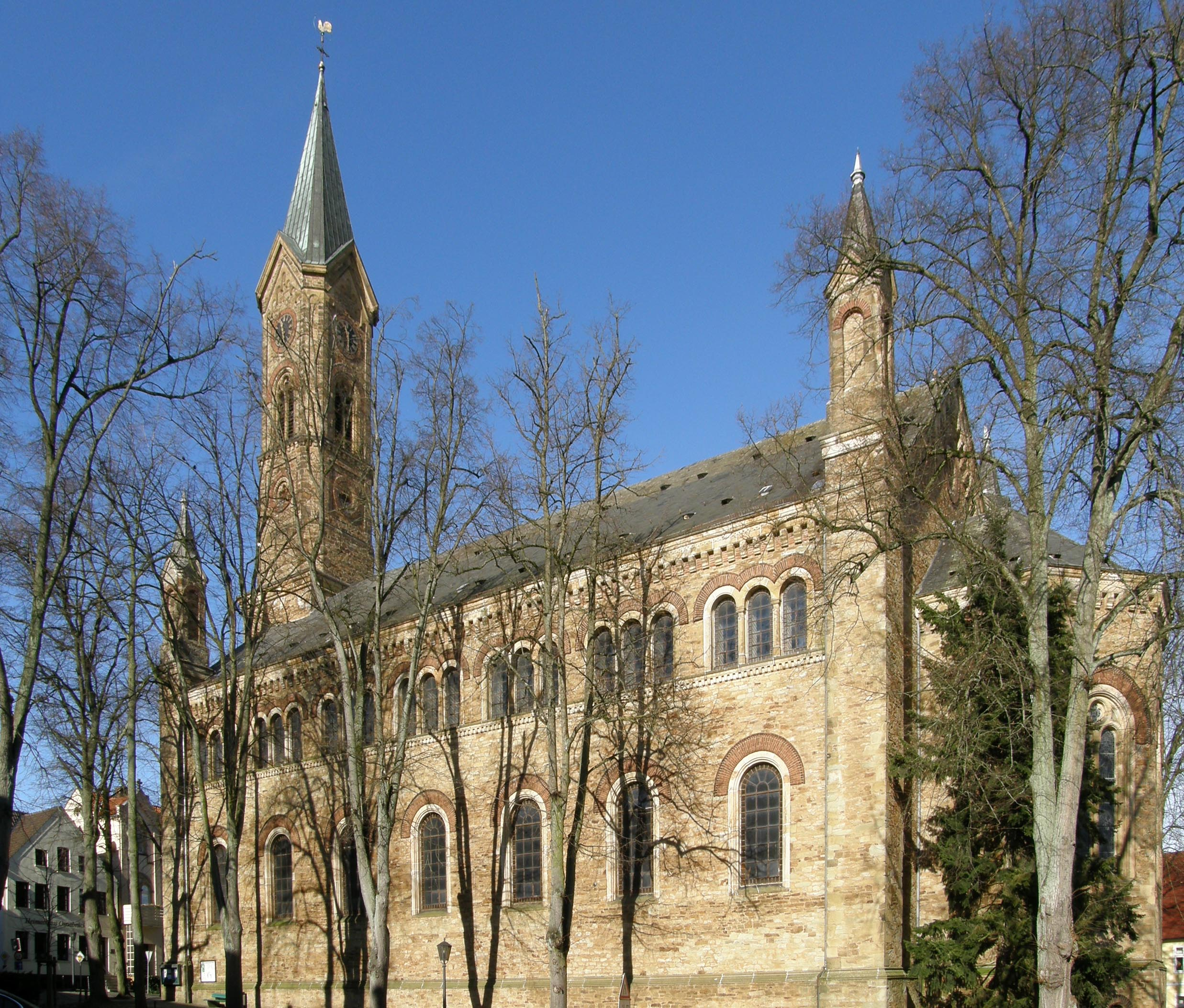 Kirche in Melle-Buer aus Süd-West-Ansicht